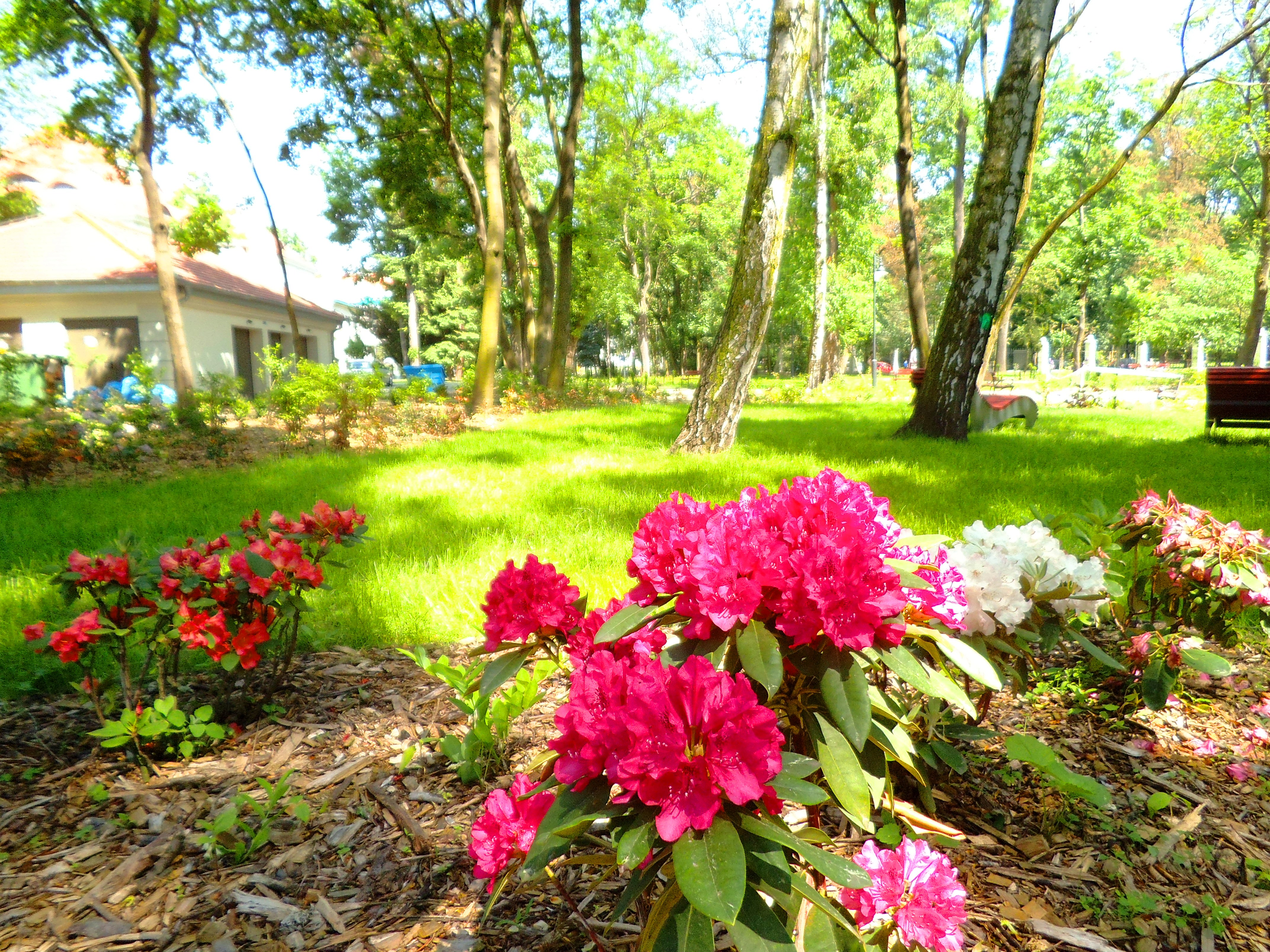 Park wojewodów pomorskich w Toruniu3